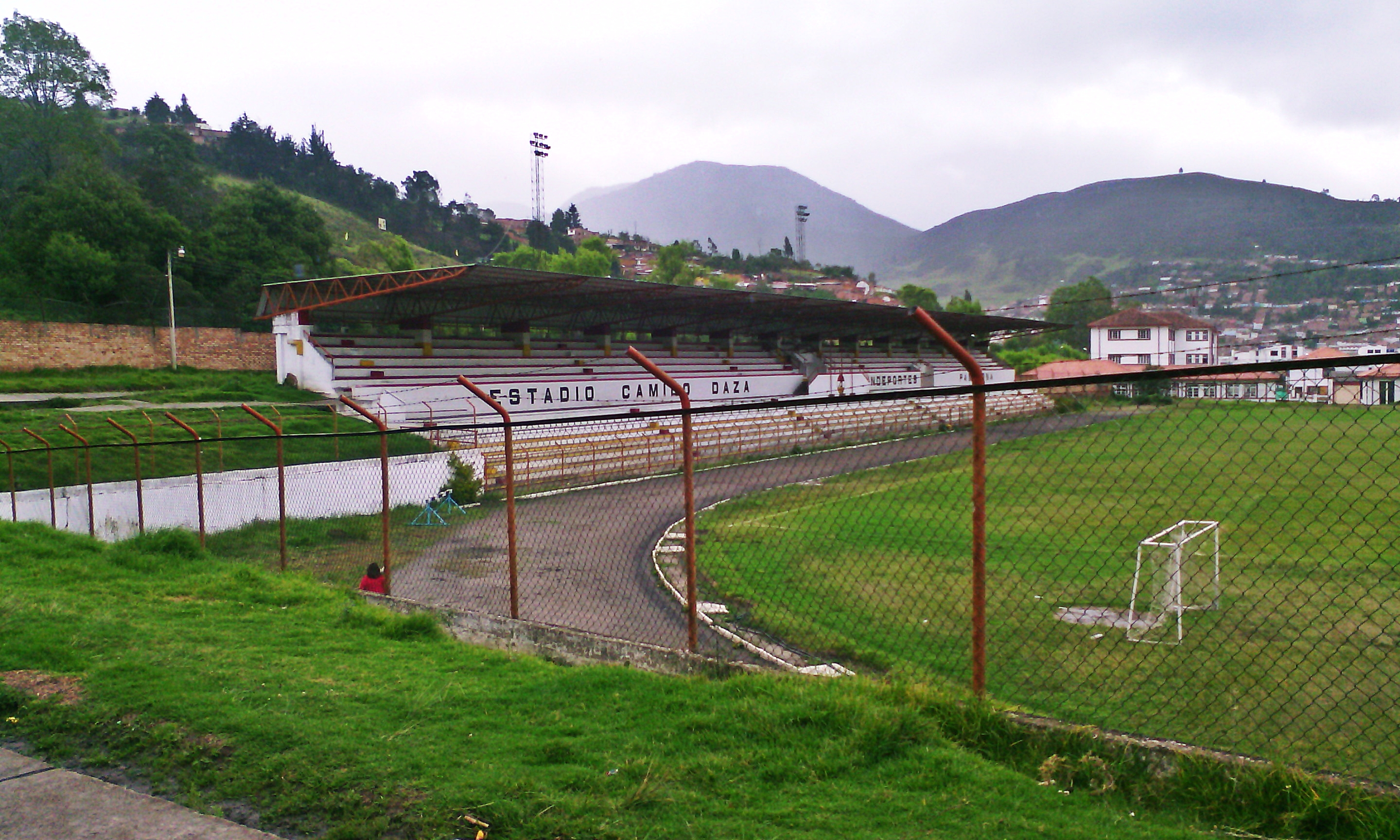 Fotografía del Estadio Camilo Daza en Pamplona Norte de Santander Fotografía: Julián Villamizar